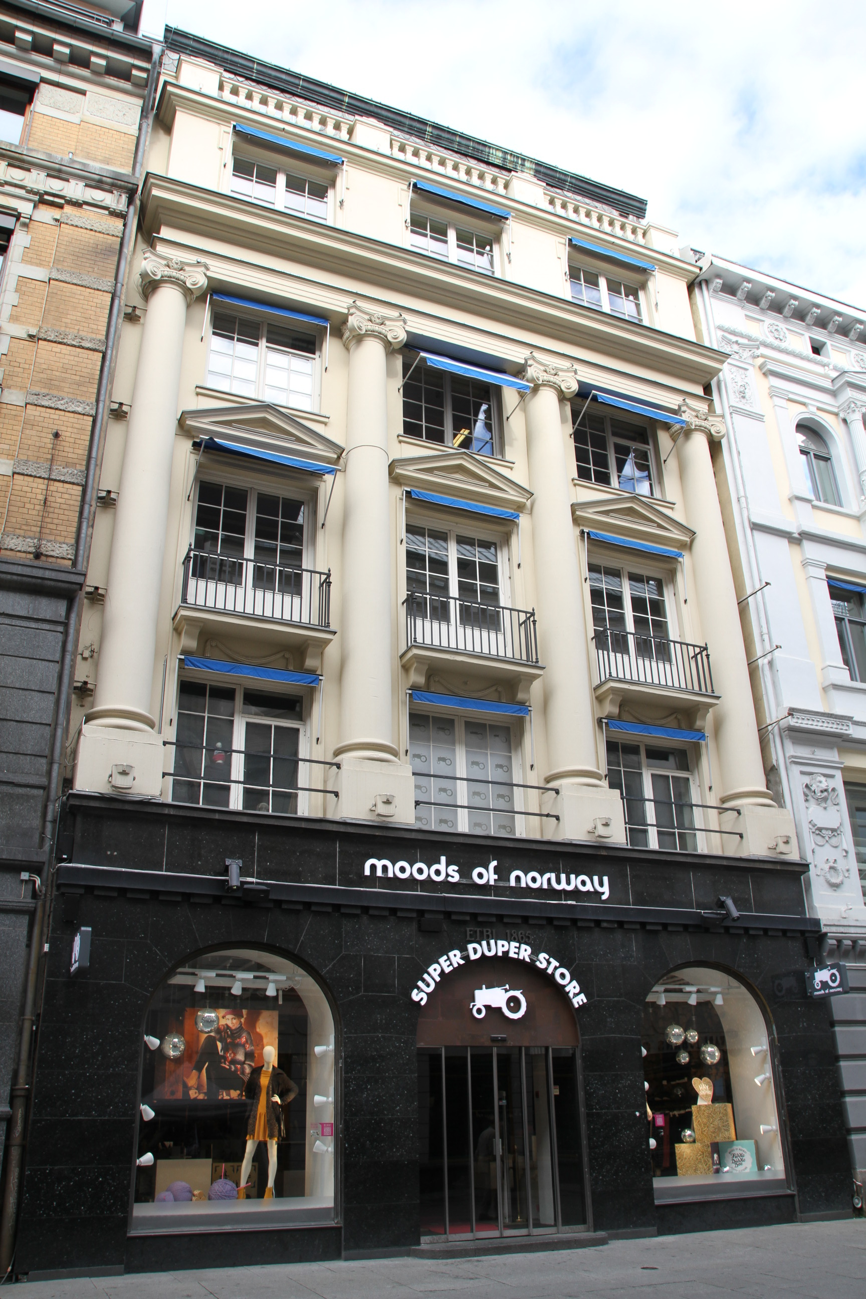 Andvordgården i Karl Johans gate / Stortorvet 3, Oslo. Forretningsgård fra 1926 tegnet av Christian Morgenstierne og Arne Eide.